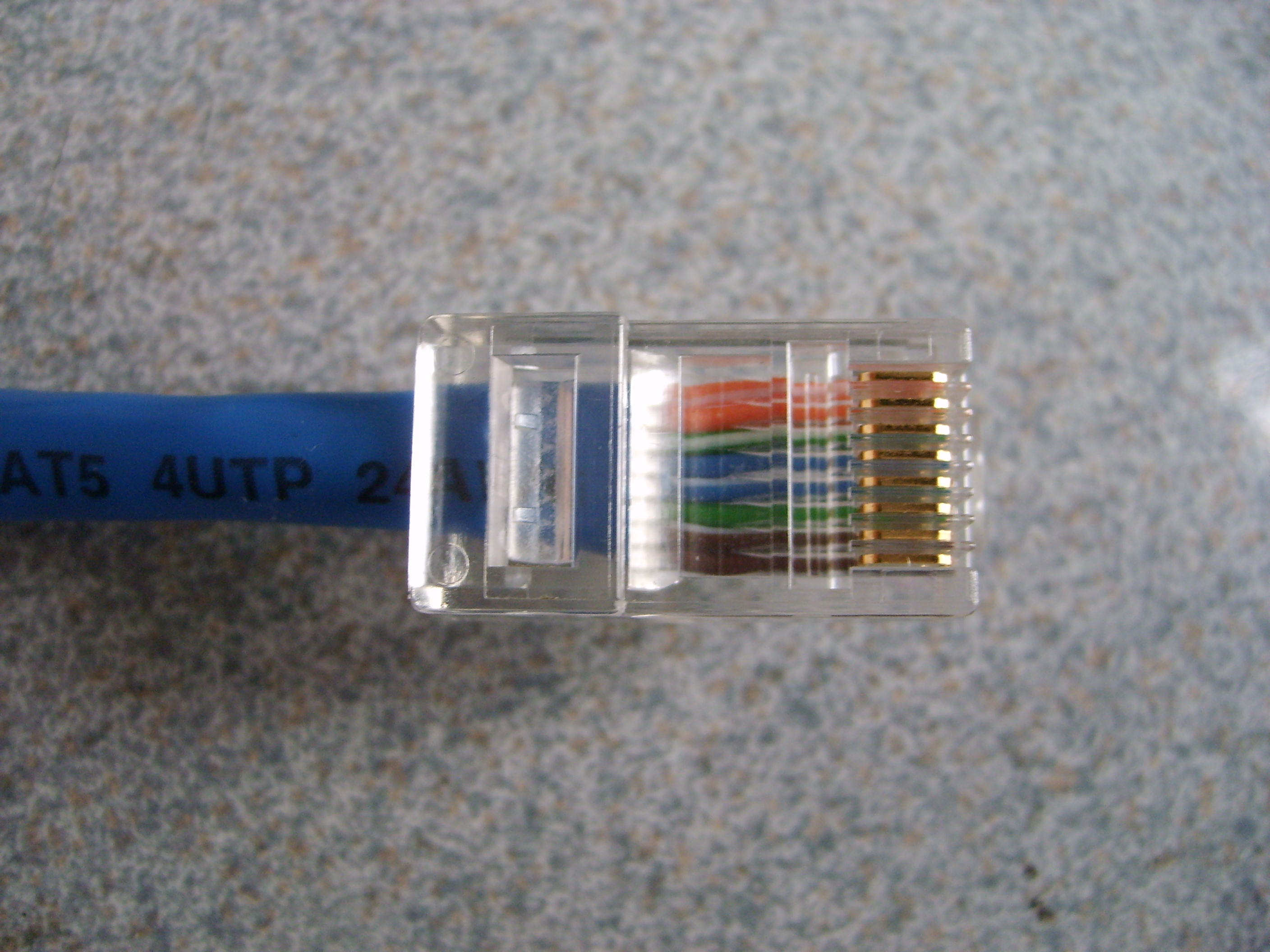 Zakończenie kabla łączówką RJ-45